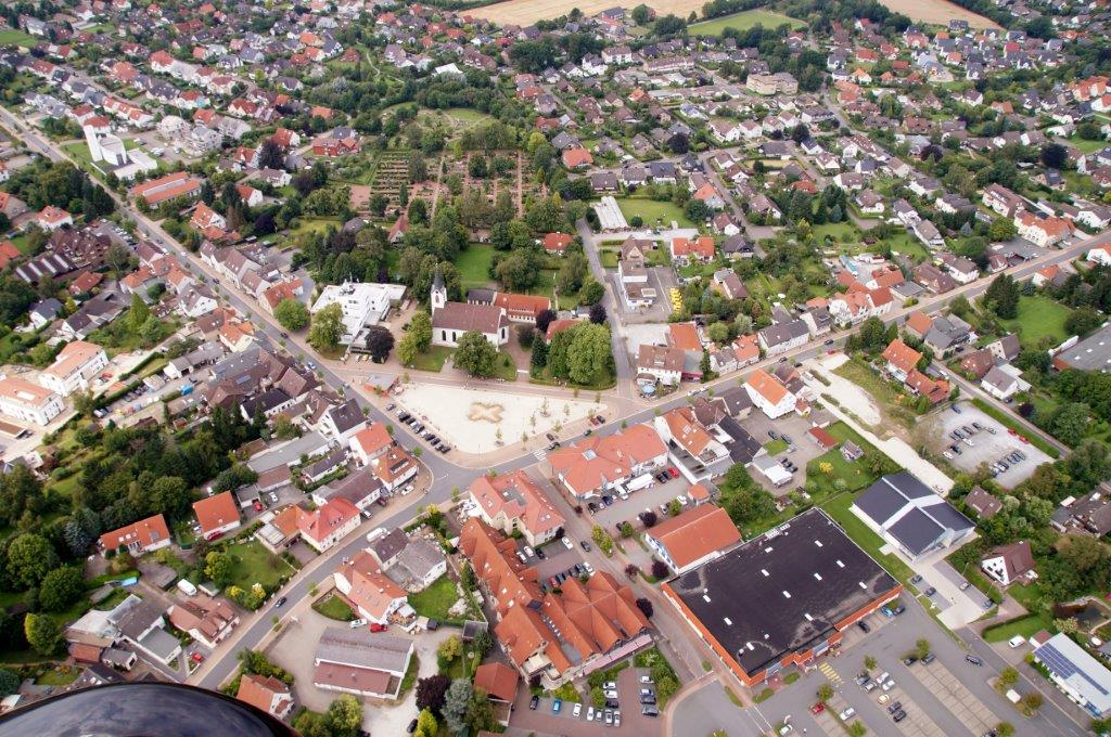 Luftbild vom Ortskern Leopoldshöhe